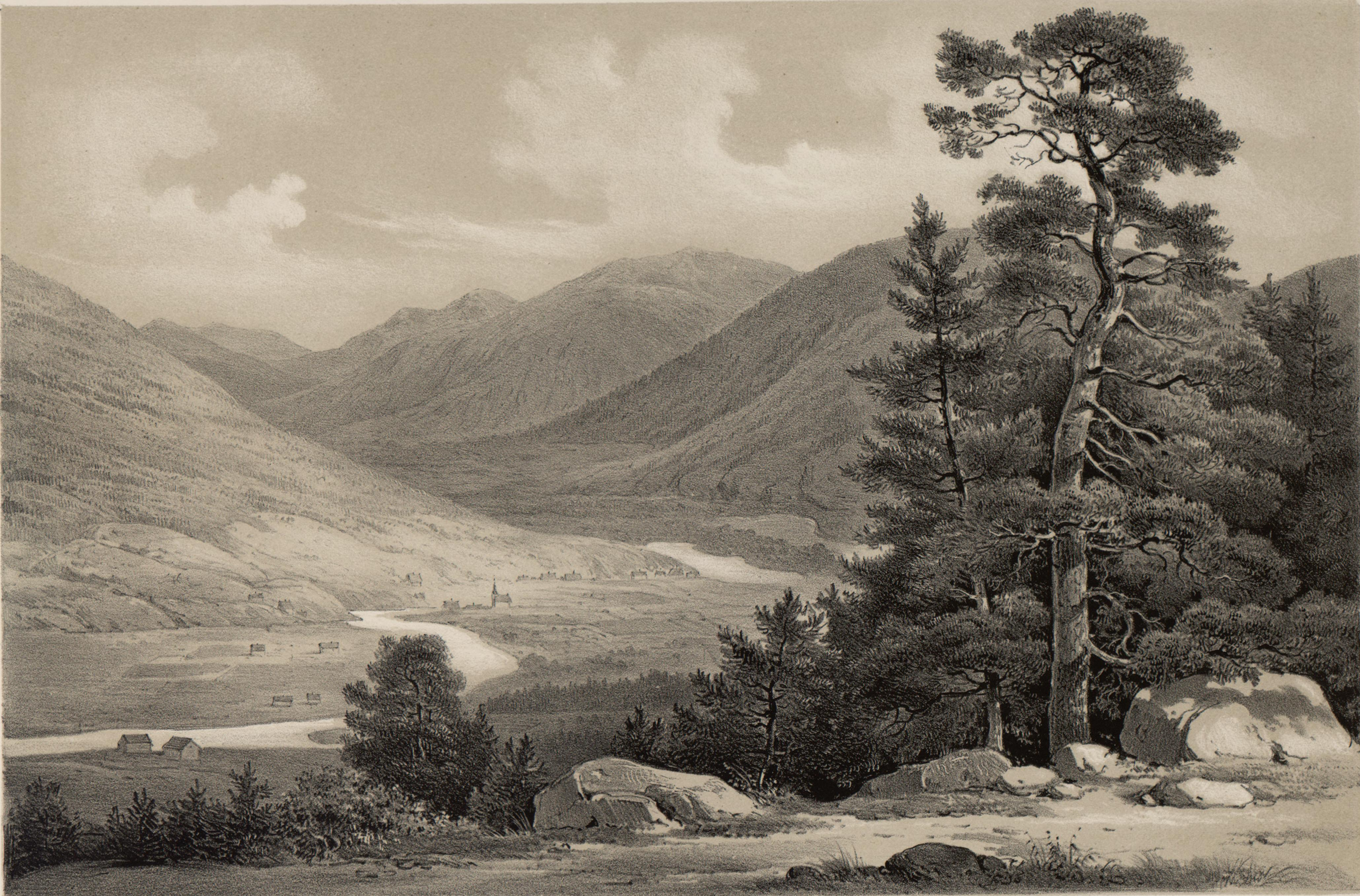 Illustrasjon hentet fra boken "Norge fremstillet i Tegninger" av Asbjørnsen, P.Chr. og utgitt av Chr. Tønsberg (no, 1848)